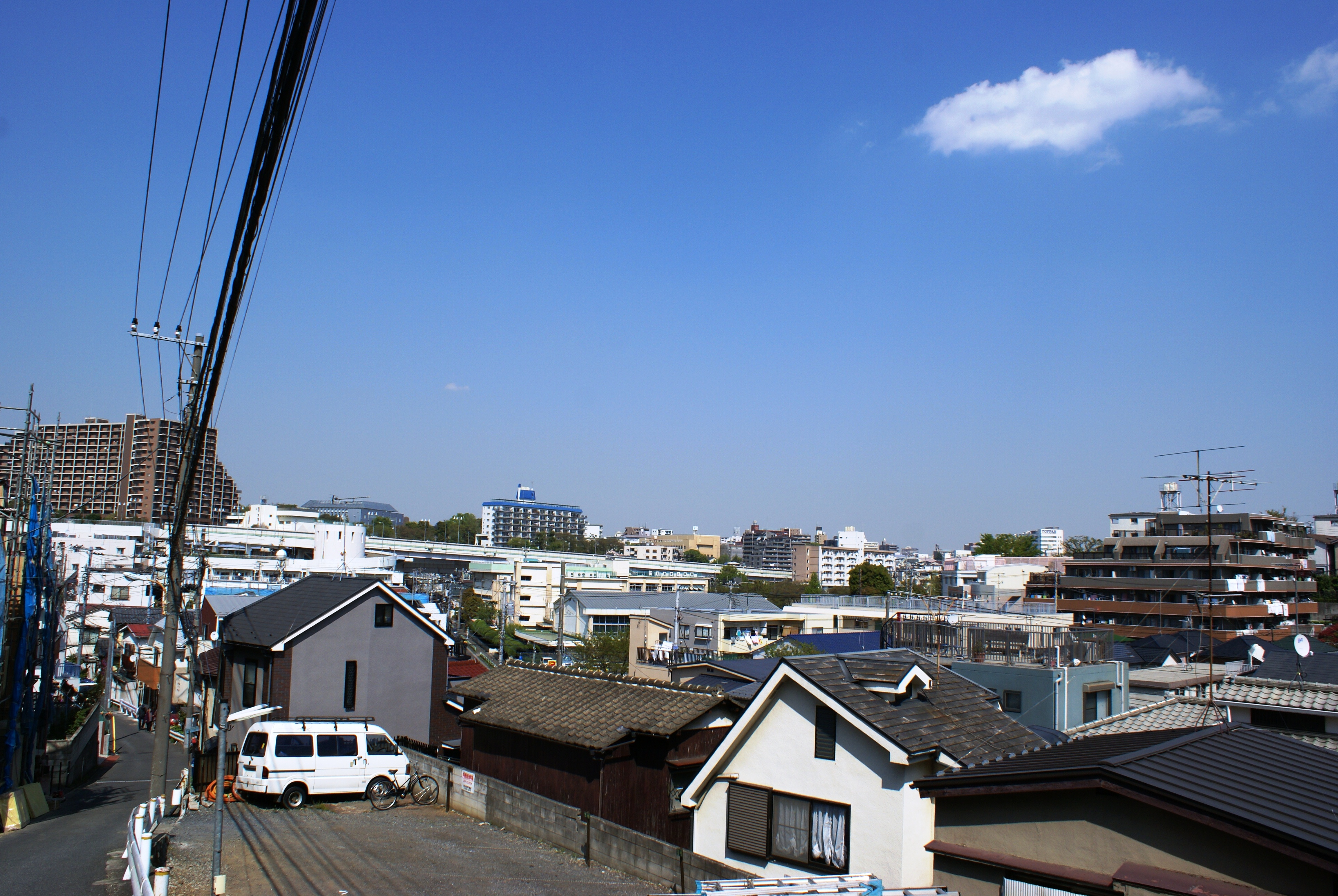 中台二丁目の谷戸地形